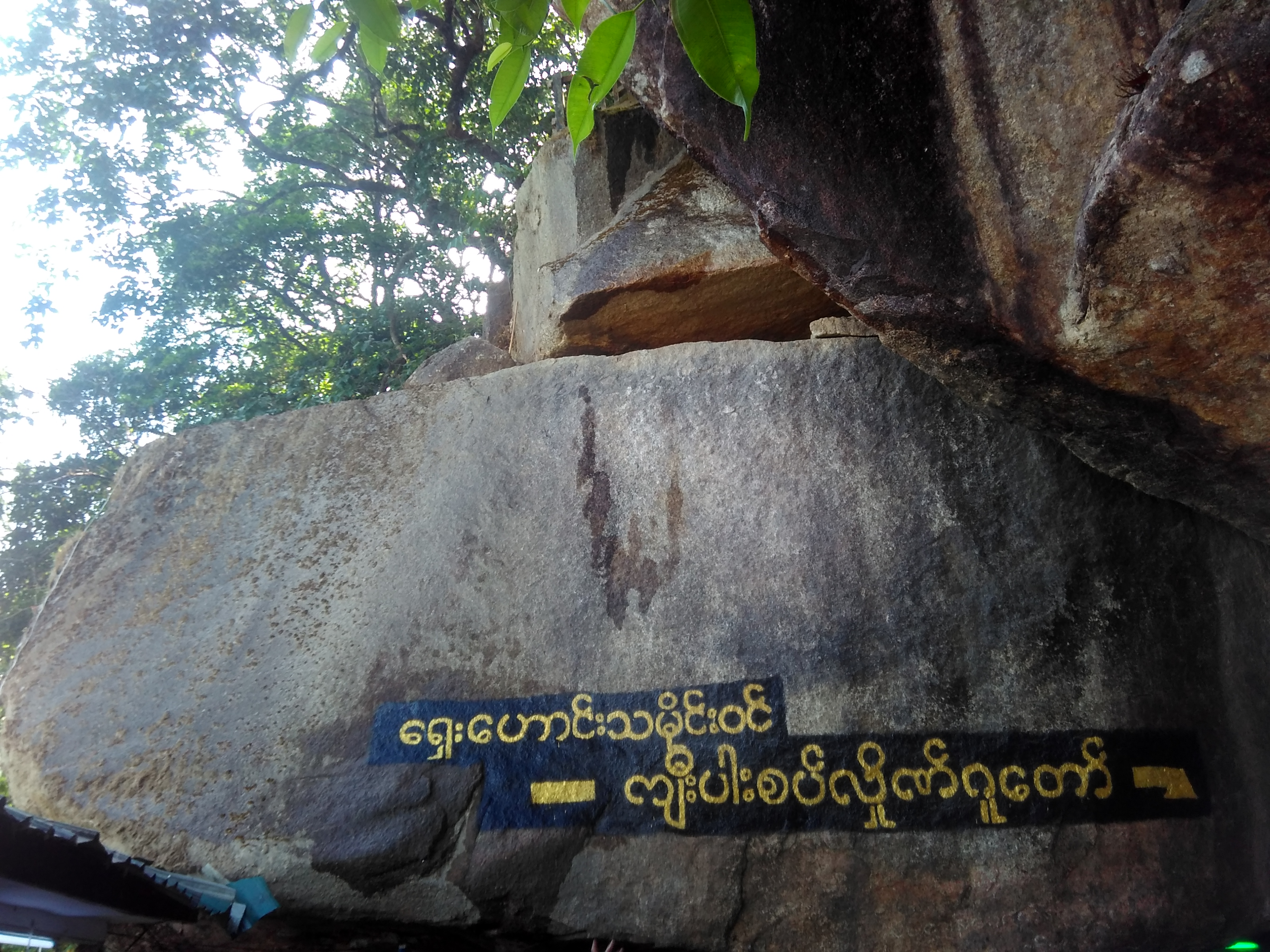 မြန်မာဘာသာ: ကျီးပါးစပ် ပုံဖြစ်သည်။ ကျိုက်ထီးရိုးဘုရားရင်ပြင်တော် မြောက်ဘက်တွင် တည်ရှိသည်။